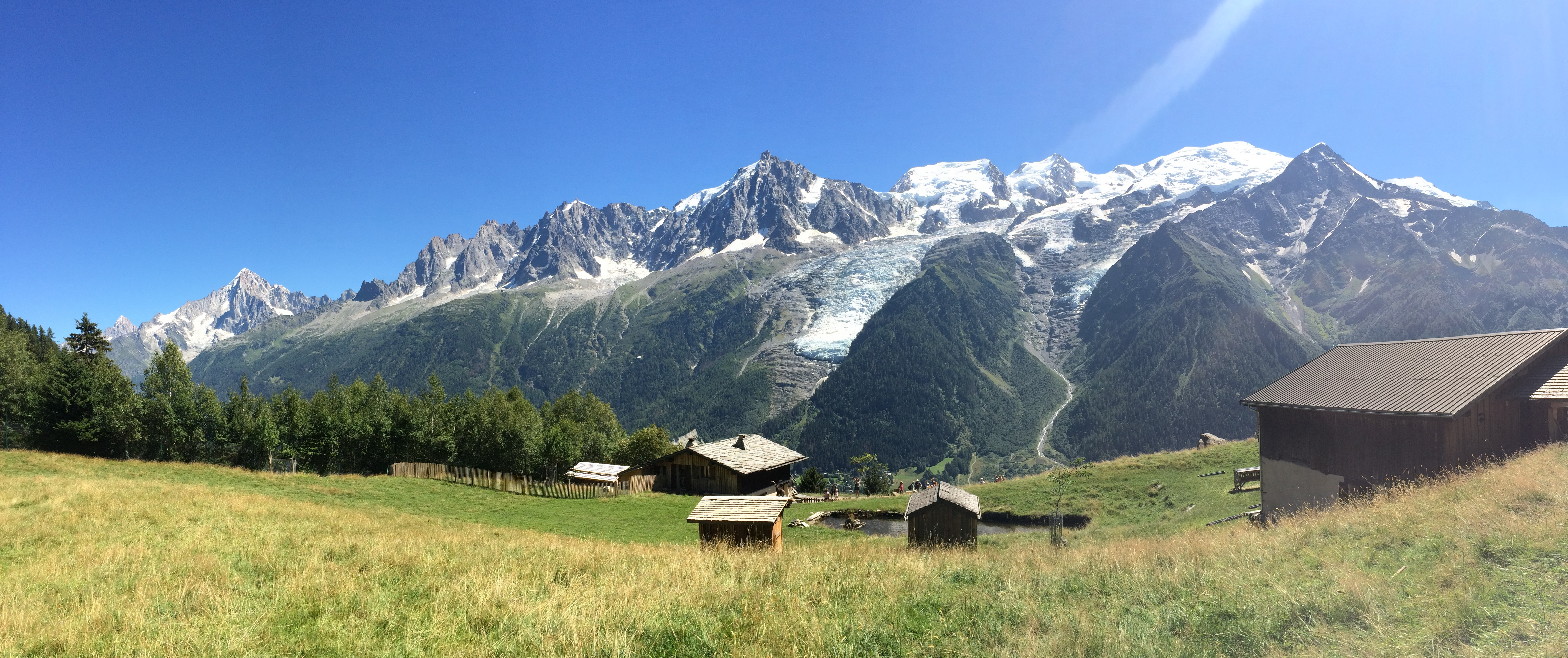 Avec, de gauche à droite : l'aiguille du Chardonnet, l'aiguille Verte, l'aiguille des Drus, l'aiguille du Grépon, l'aiguille de Blaitière, l'aiguille du Plan, l'aiguille du Midi, le glacier des Bossons, le mont Blanc du Tacul, le mont Maudit, le glacier de Taconnaz, le mont Blanc, le dôme du Goûter, l'aiguille du Goûter et l'aiguille de Bionnassay.